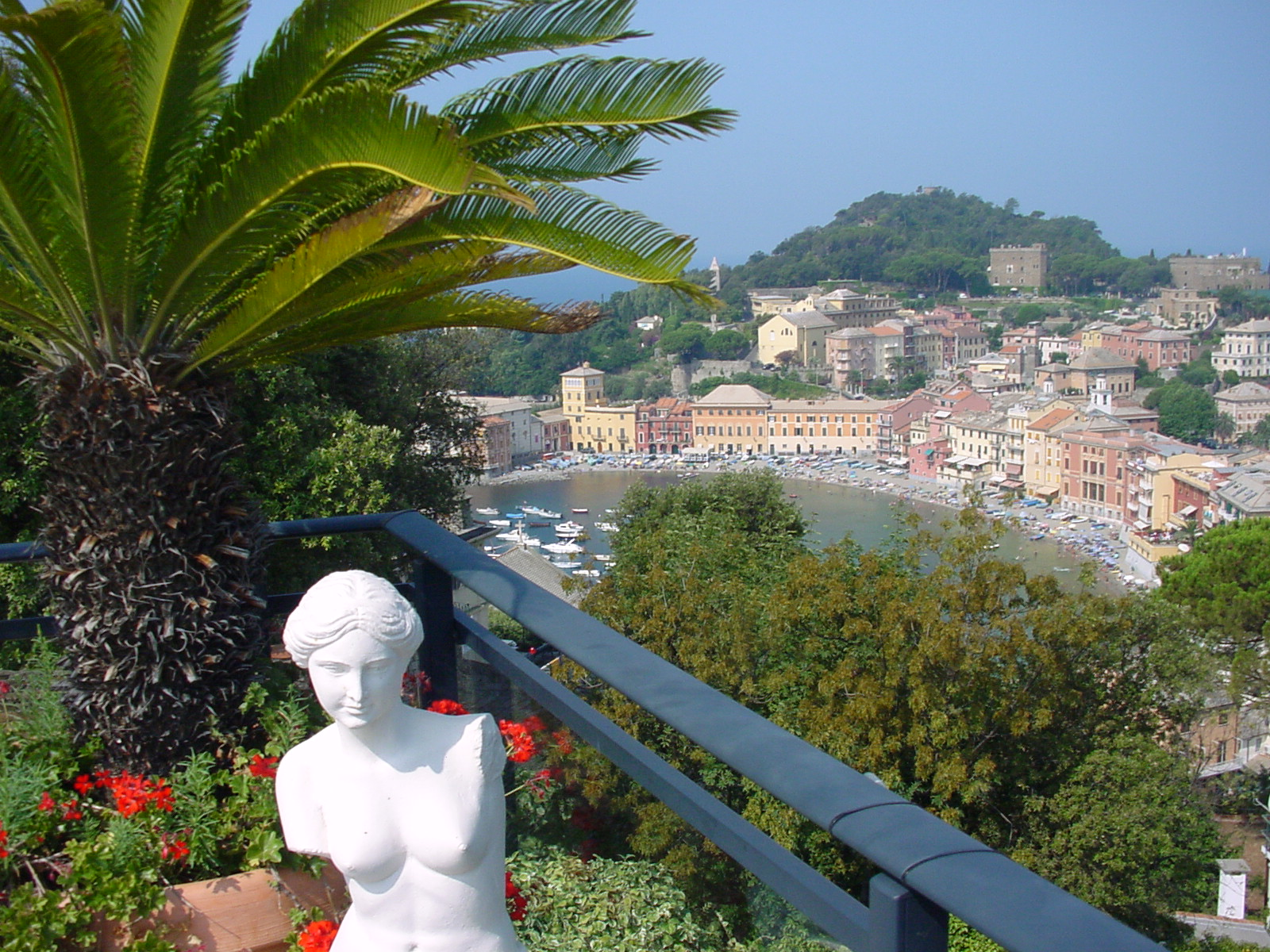 Sestri Levante vom Hotel Vis a Vis gesehen